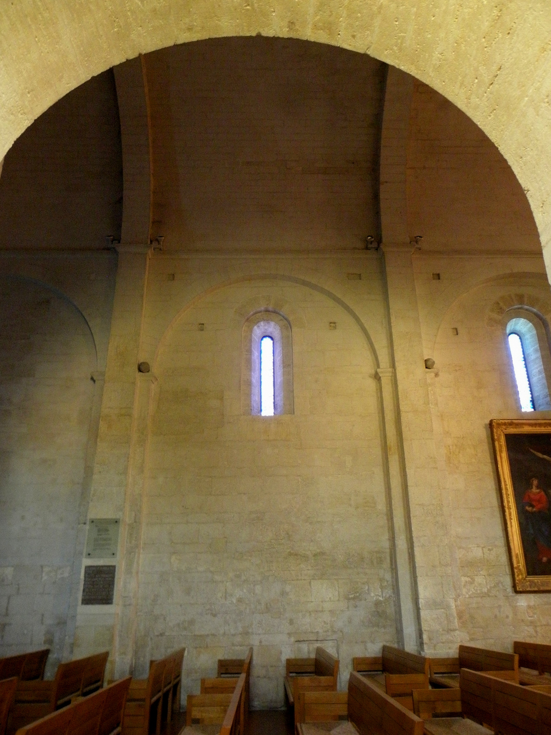 Église Saint-Jean-Baptiste de Castelnau-le-Lez (34). Vue traversante du collatéral nord.